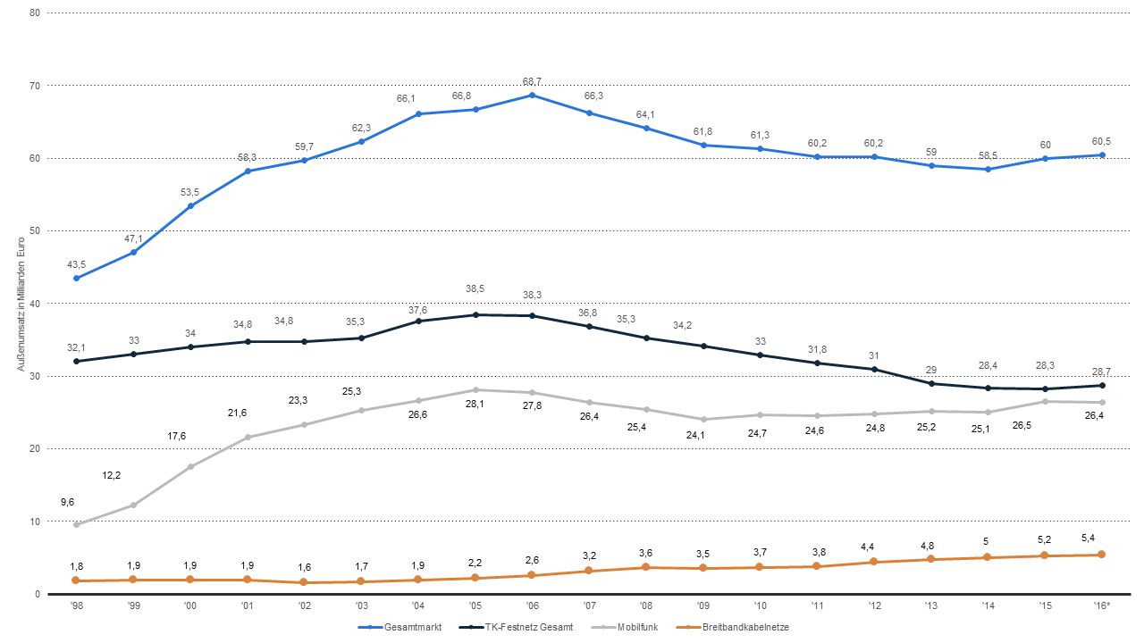 Die Abbildung stellt den Außenumsatz in Milliarden Euro der Telekommunikationsbranche dar. Der Betrachtungszeitraum geht von 1998 bis 2016. Der Umsatz des Telekommunikationsmarkts wird in drei Klassen Festnetz, Mobilfunk und Breitbandkabel unterteilt. In der Abbildung ist zu erkennen, dass der Markt nach der Liberalisierung im Jahr 1998 stark gewachsen ist. Das Phasing-Out des monopolistischen Bottlenecks der Deutschen Telekom erfolgte über die Innovation des Mobilfunkes. Dadurch wurde ein Wettbewerb auf dem Telekommunikationsmarkt möglich. Nach der Finanzkrise 2008/2009 schrumpfte der Markt aufgrund der schlechten Konjunktur. Die Bundesregierung fördert den Ausbau eines flächendeckenden Breitbandnetzes mit einer Downloadgeschwindigkeit von 50 Mbit/s seit dem Jahr 2008. Dies ist eine Maßnahme des im selben Jahr beschlossenen Konjunkturpaketes. Die Prognosen für den Telekommunikationsmarkt bis 2020 deuten auf einen wieder schrumpfenden, anstatt eines momentan stagnierenden Marktes. Die Europäische Union plant bereits über diesen Zeitraum hinaus weitere Förderungsmaßnahmen der Netzinfrastruktur.